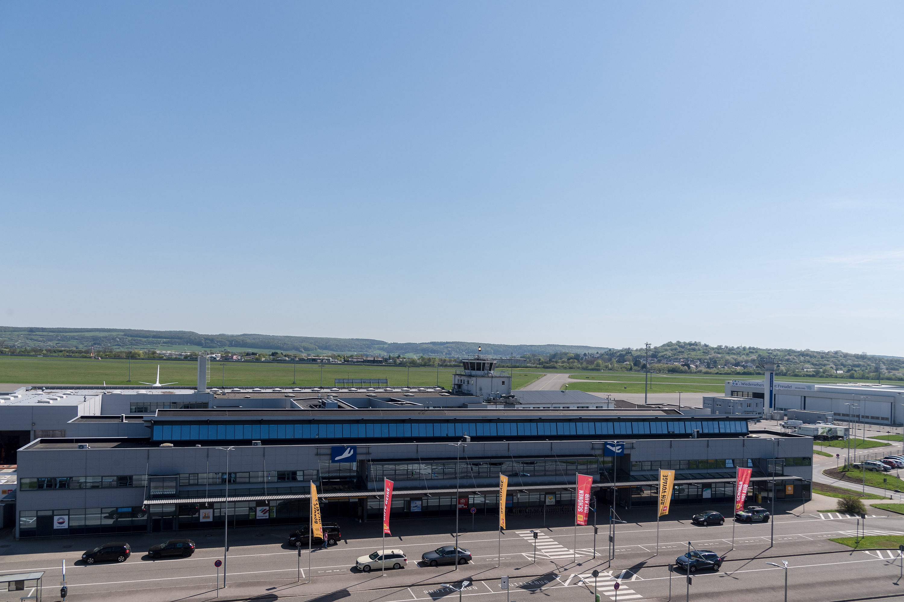 Terminal des Flughafens Saarbrücken (Vorderansicht)